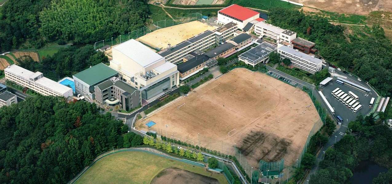 向陽台高等学校